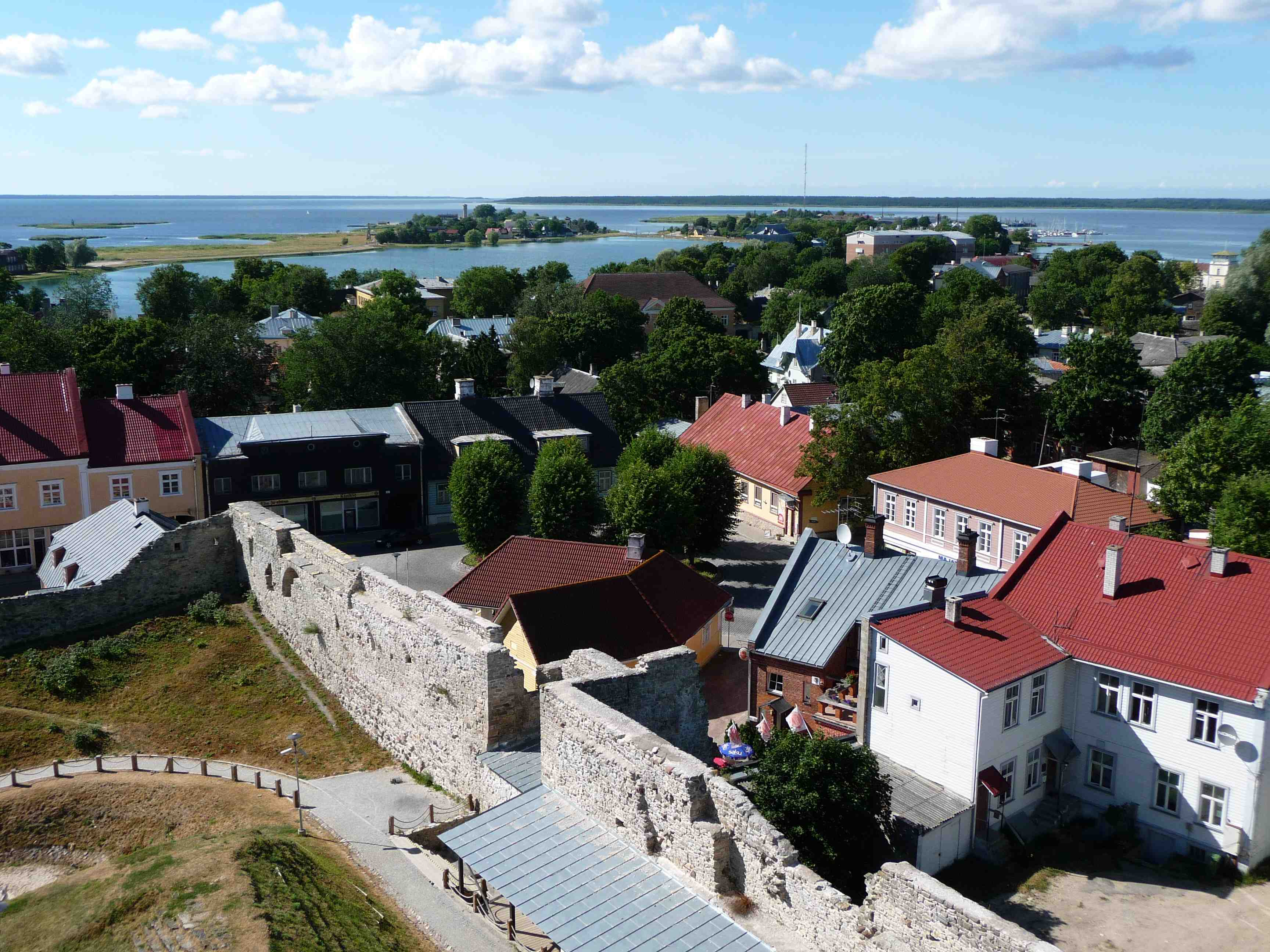 Blick vom Turm der Bischofsburg Haapsalu auf den Hafen